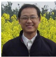 中文（中国大陆）: 枝江百里洲人，吕邦列 2004年中国湖北省人大代表